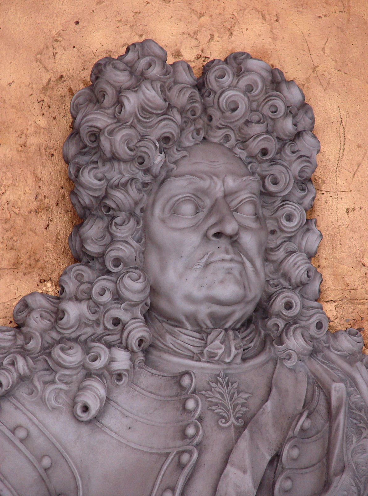 Niels Juel (1629-1697), admiral, detalje fra gravminde i Holmens Kirke, København